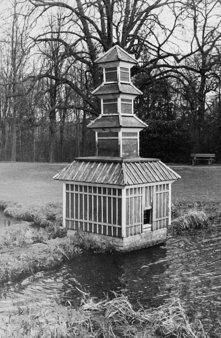 Overzicht van de voorgevel (opmerking: Afdrukken verkregen via Ypie Attema, oud medewerkster van de Rijksdienst voor de Monumentenzorg.)